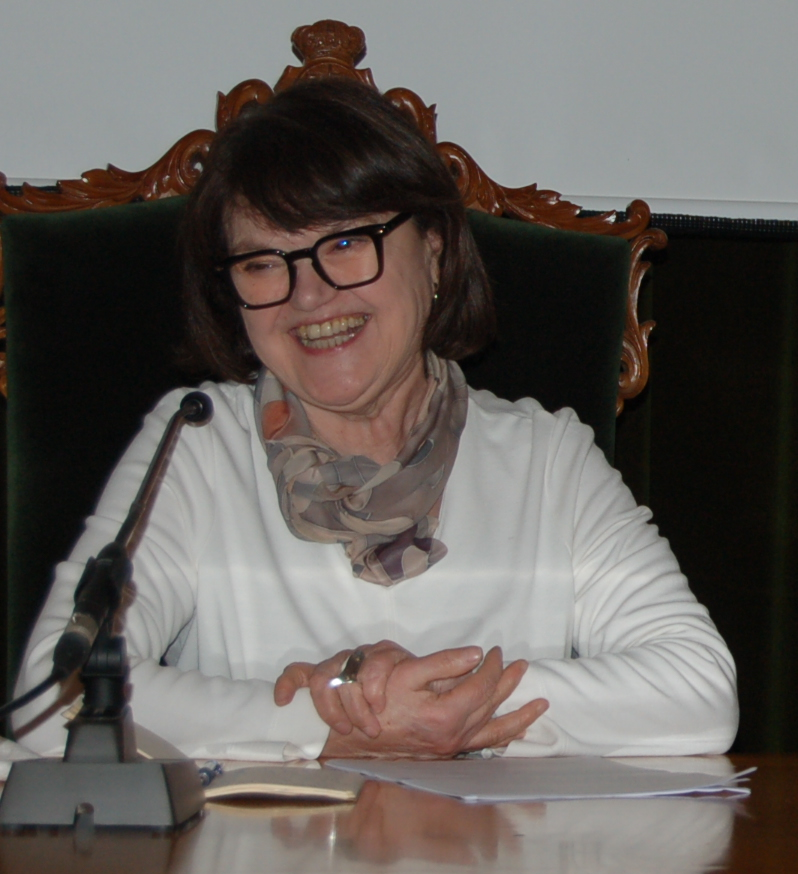 Margarita Ledo e Tereixa Navaza no Abril Oteriano 2018